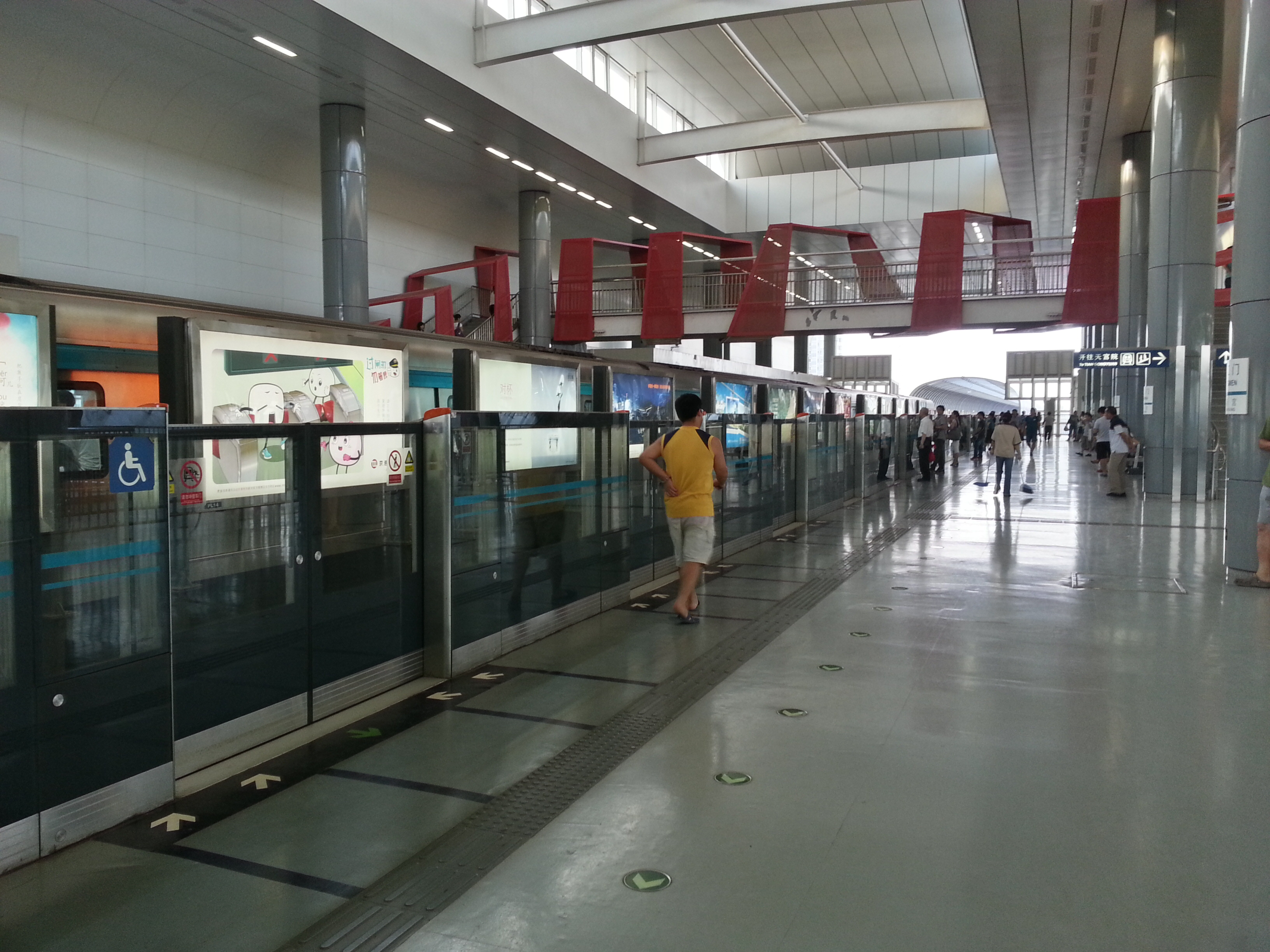 西红门站站内